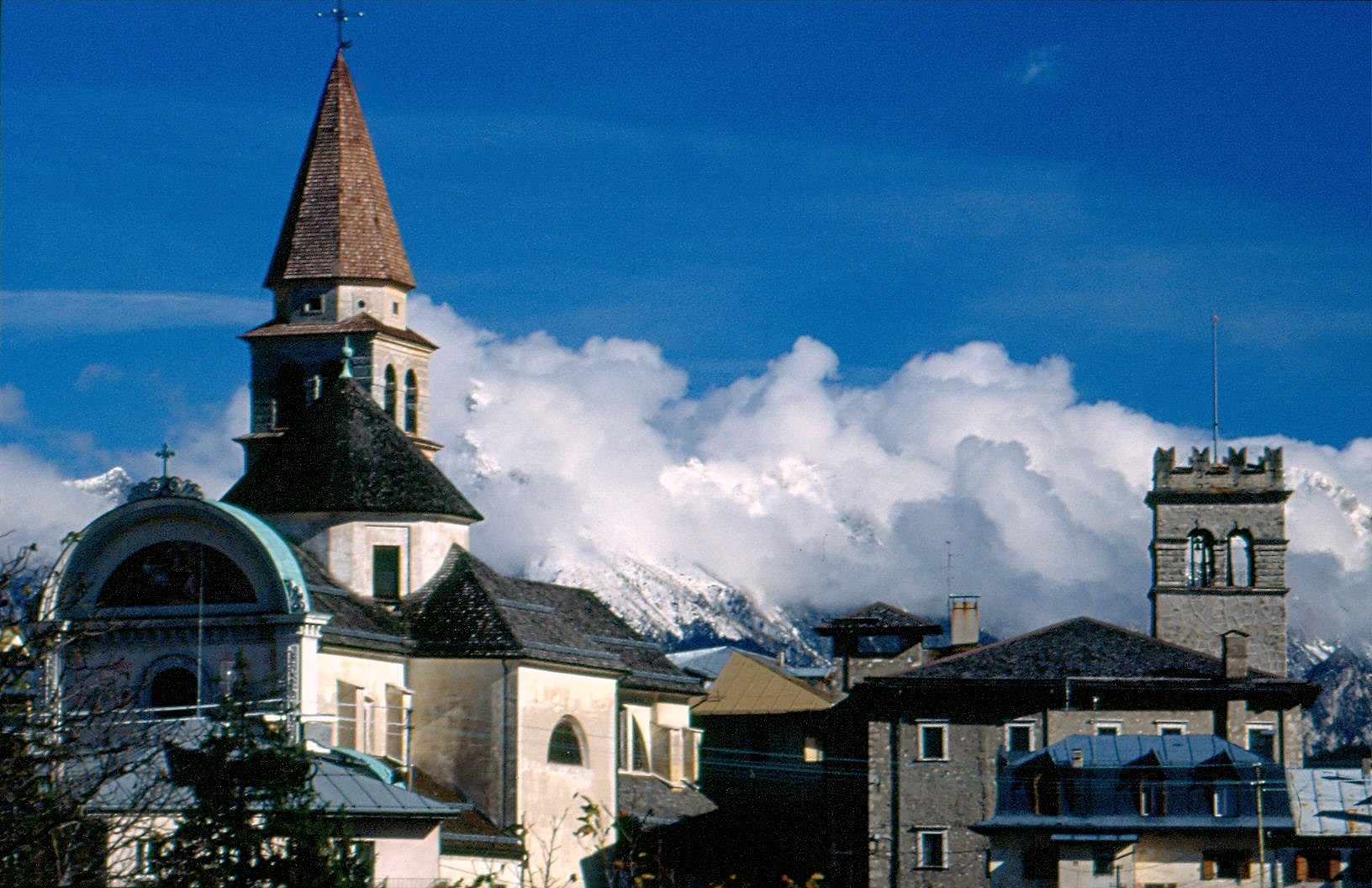 Veduta di Pieve